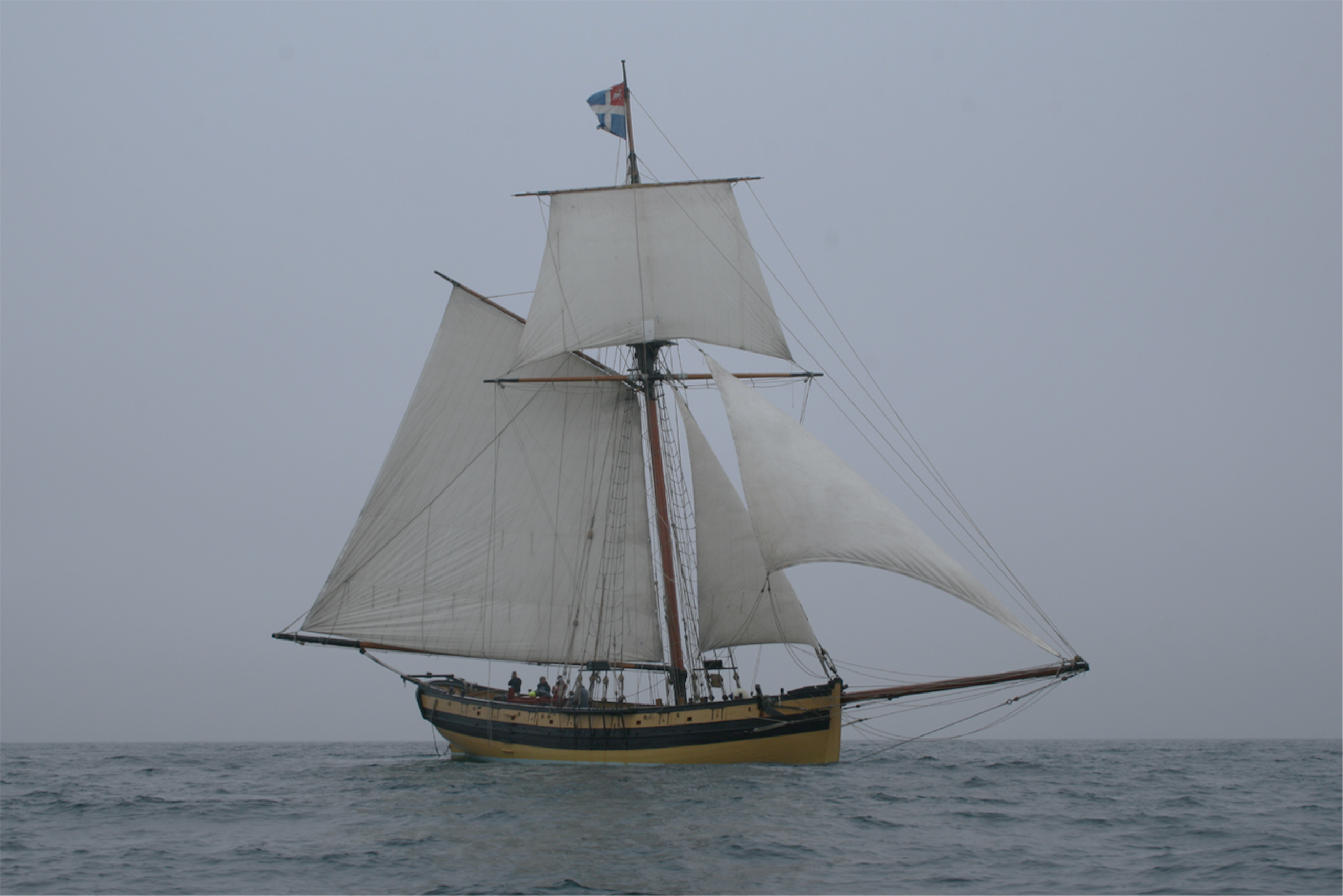 Le Renard, côtre à hunier du corsaire malouin Robert Surcouf.